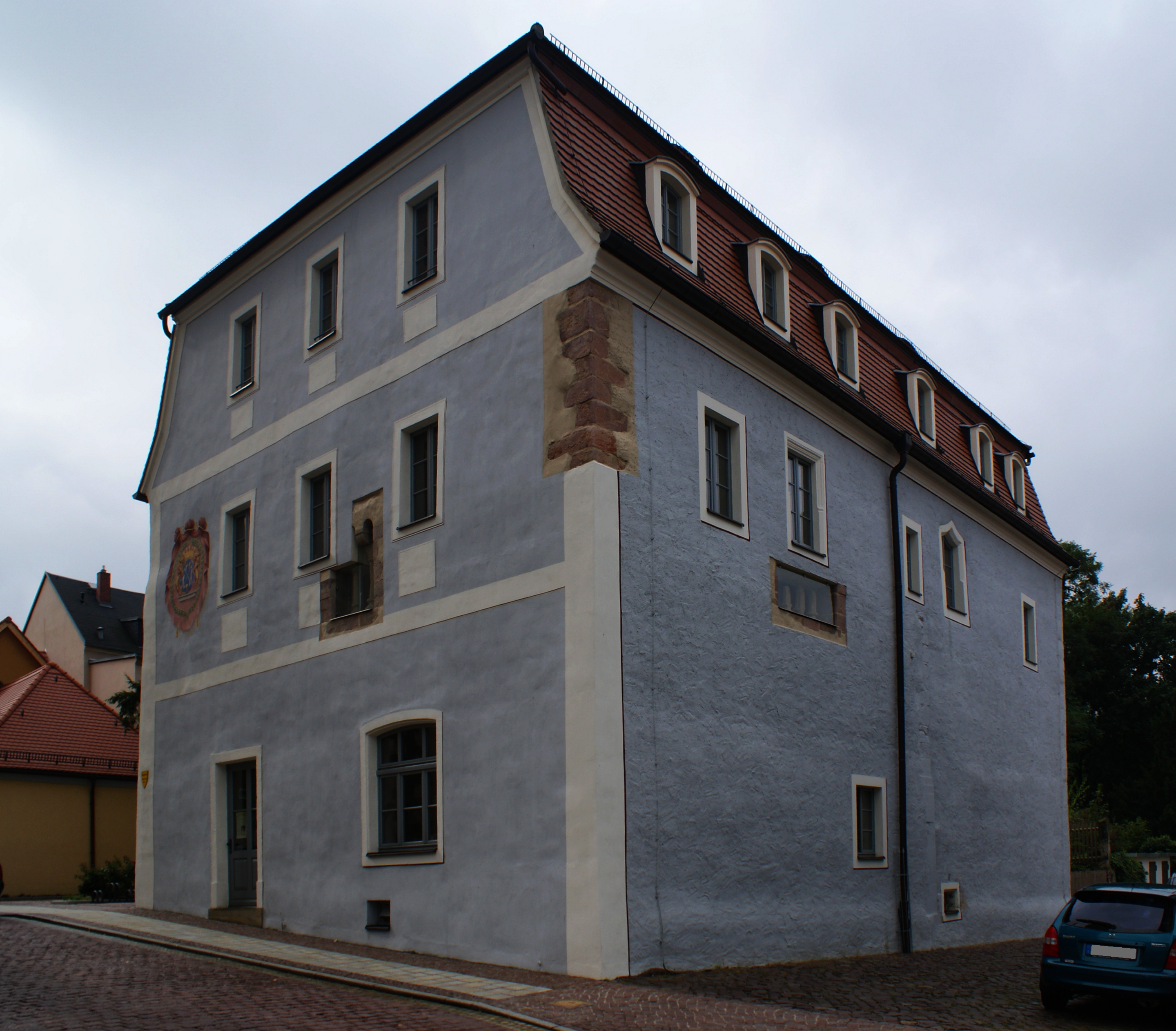 Das Vogtshaus in Oschatz (Sachsen), Ansicht von Nordost.